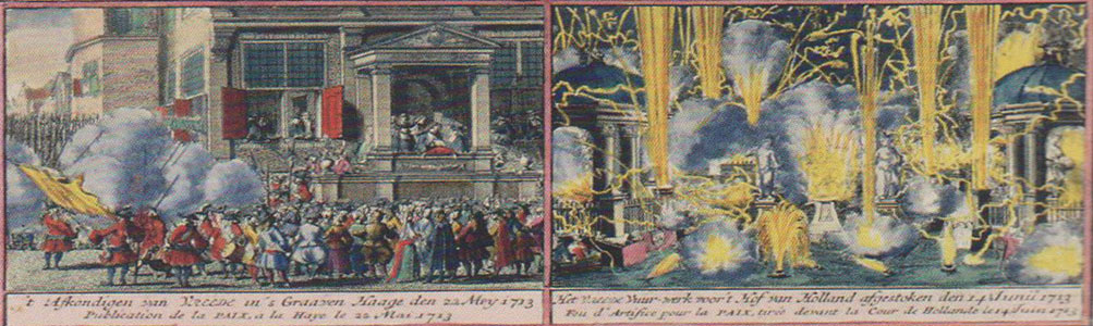 Ideé de la Paix conclue entre les HAUTS ALLIÉS et les FRANÇOIS dans la ville d'UTRECHT